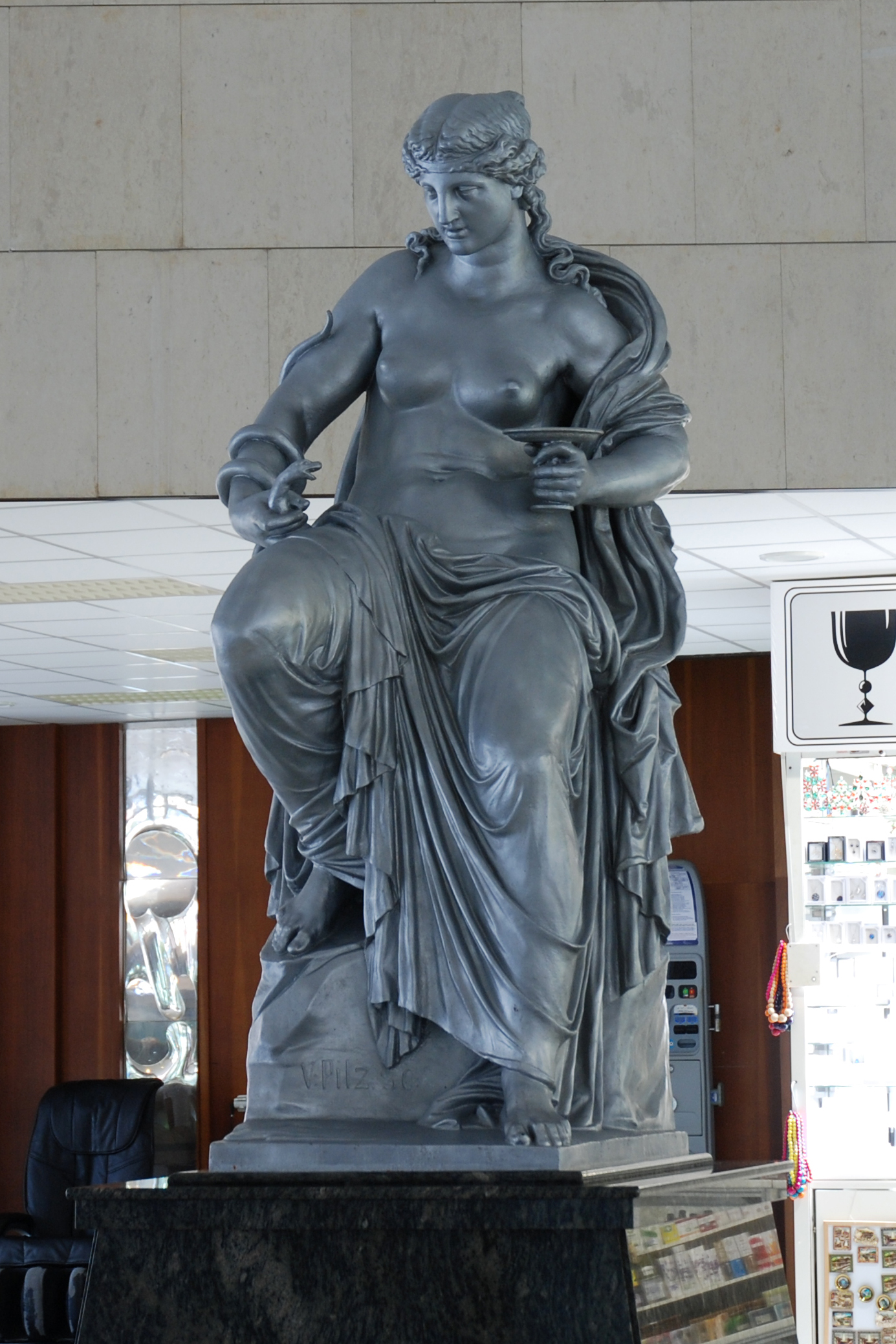 Socha Hygie ve Vřídelní kolonádě v Karlových Varech